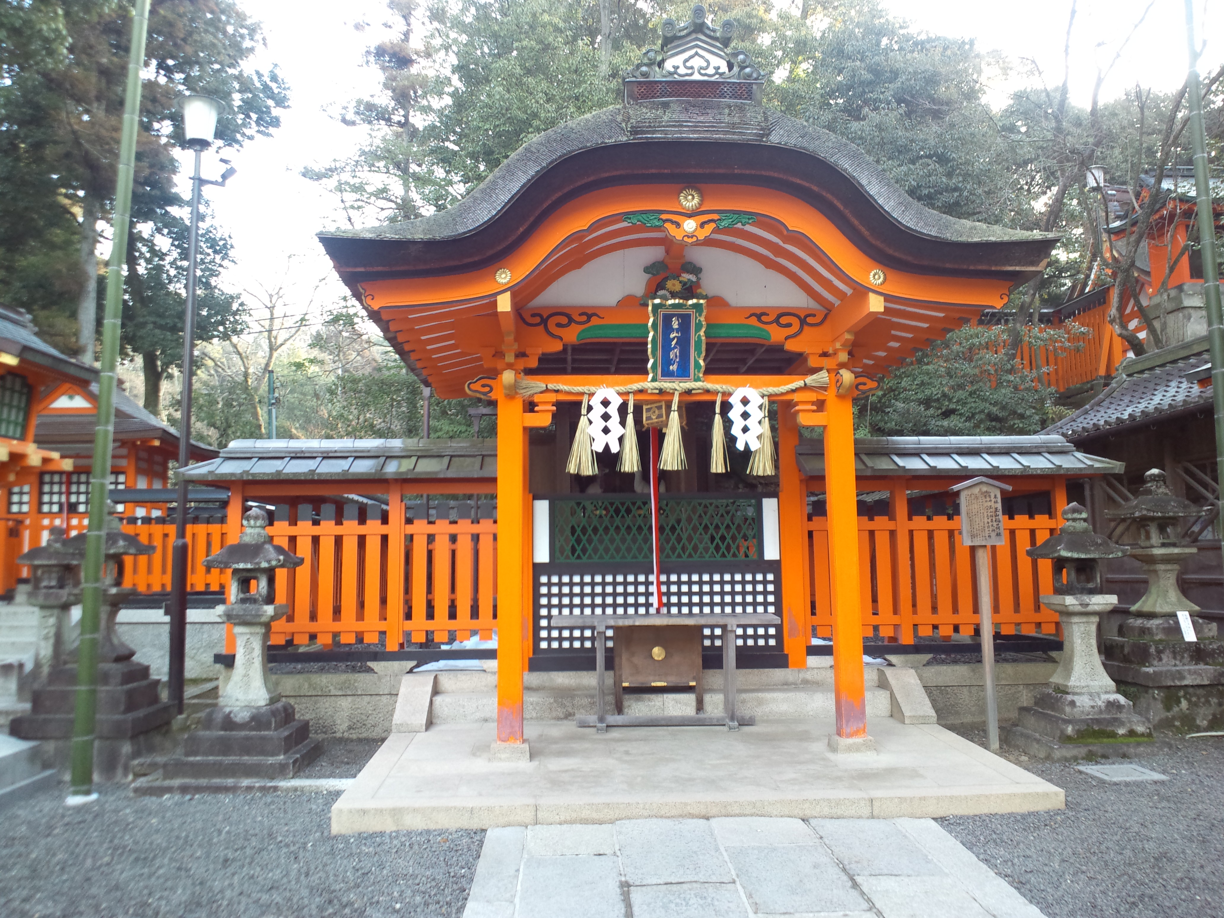 伏見稲荷大社 玉山稲荷社